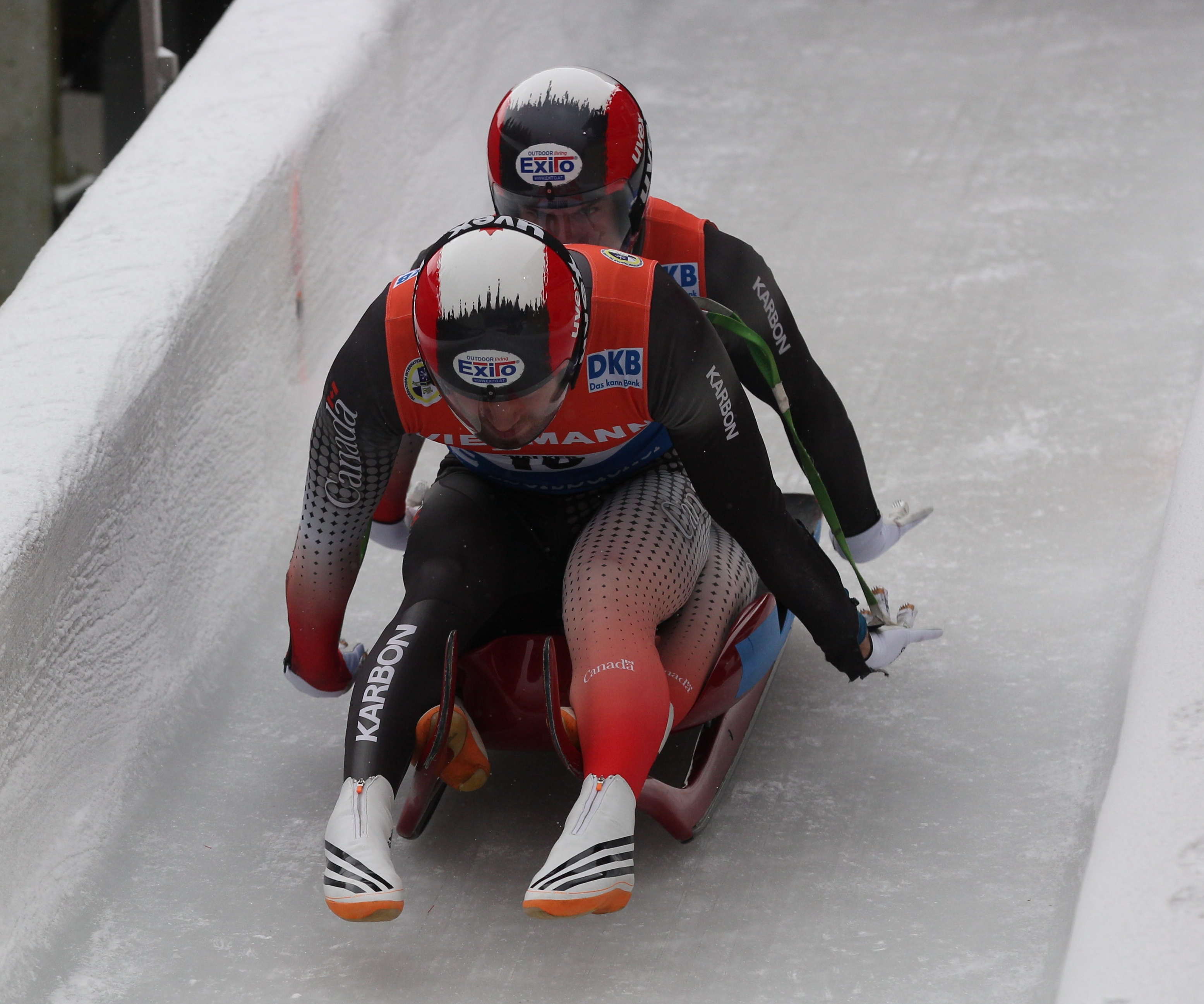 Justin Snith und Tristan Walker beim Training zum Rennrodel-Weltcup in Altenberg 2017